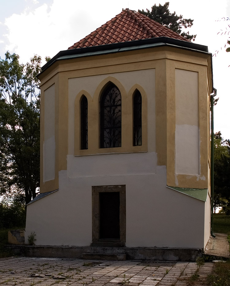 Zvonice u Modřanského kostela